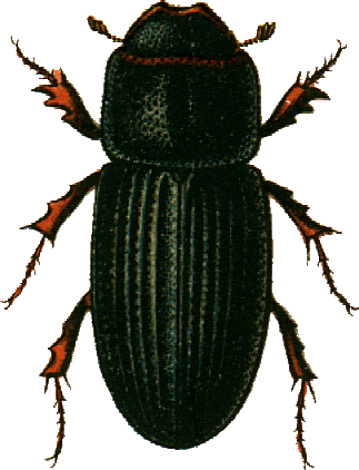 This file has been extracted from another file: Jacobs26.jpg